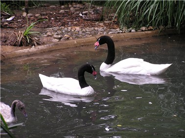 Zwarthalszwaan